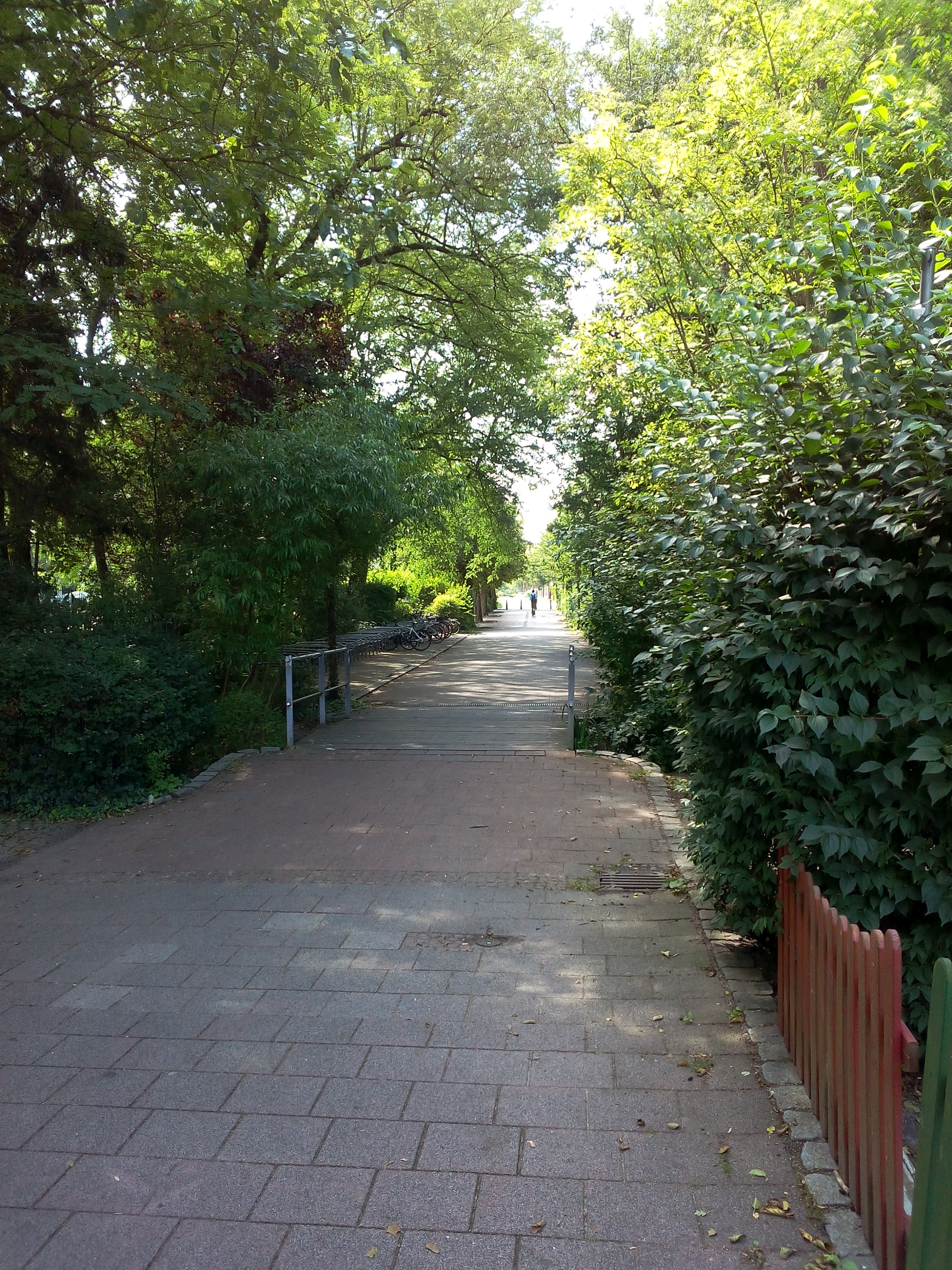 Ein Teil der Weitzgrunder Straße in Bad Belzig